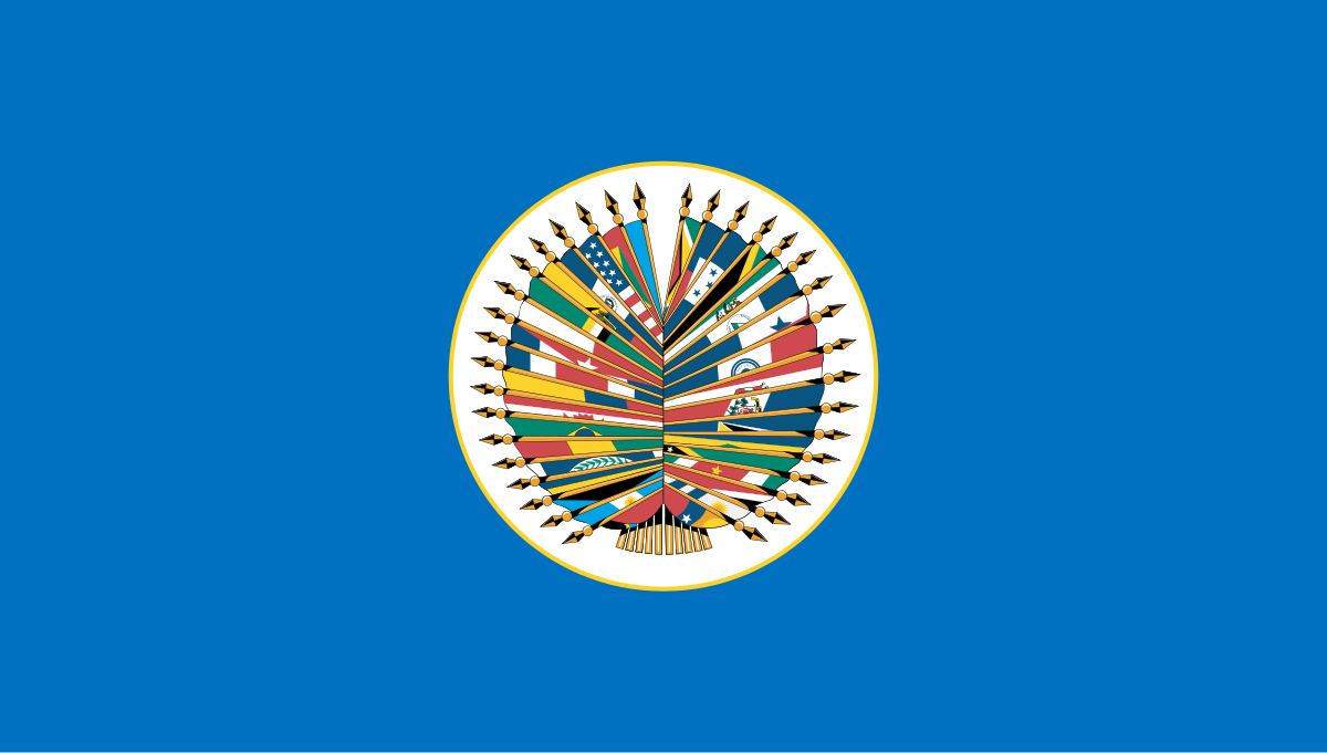 logo OEA español vertical